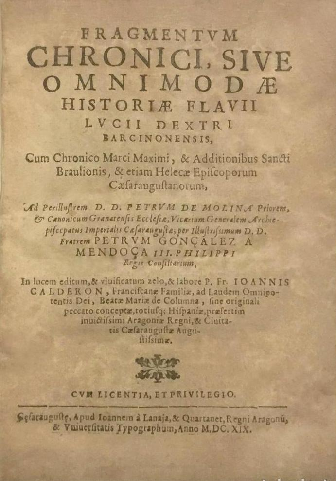 Page de titre des Chronici (Cronicones), apocryphe du sénateur romain Dexter, fabriqué par Jerónimo Román de la Higuera et publié en 1619.